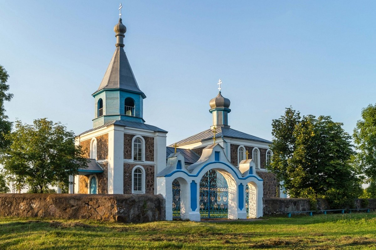 Мільча. Праваслаўная царква